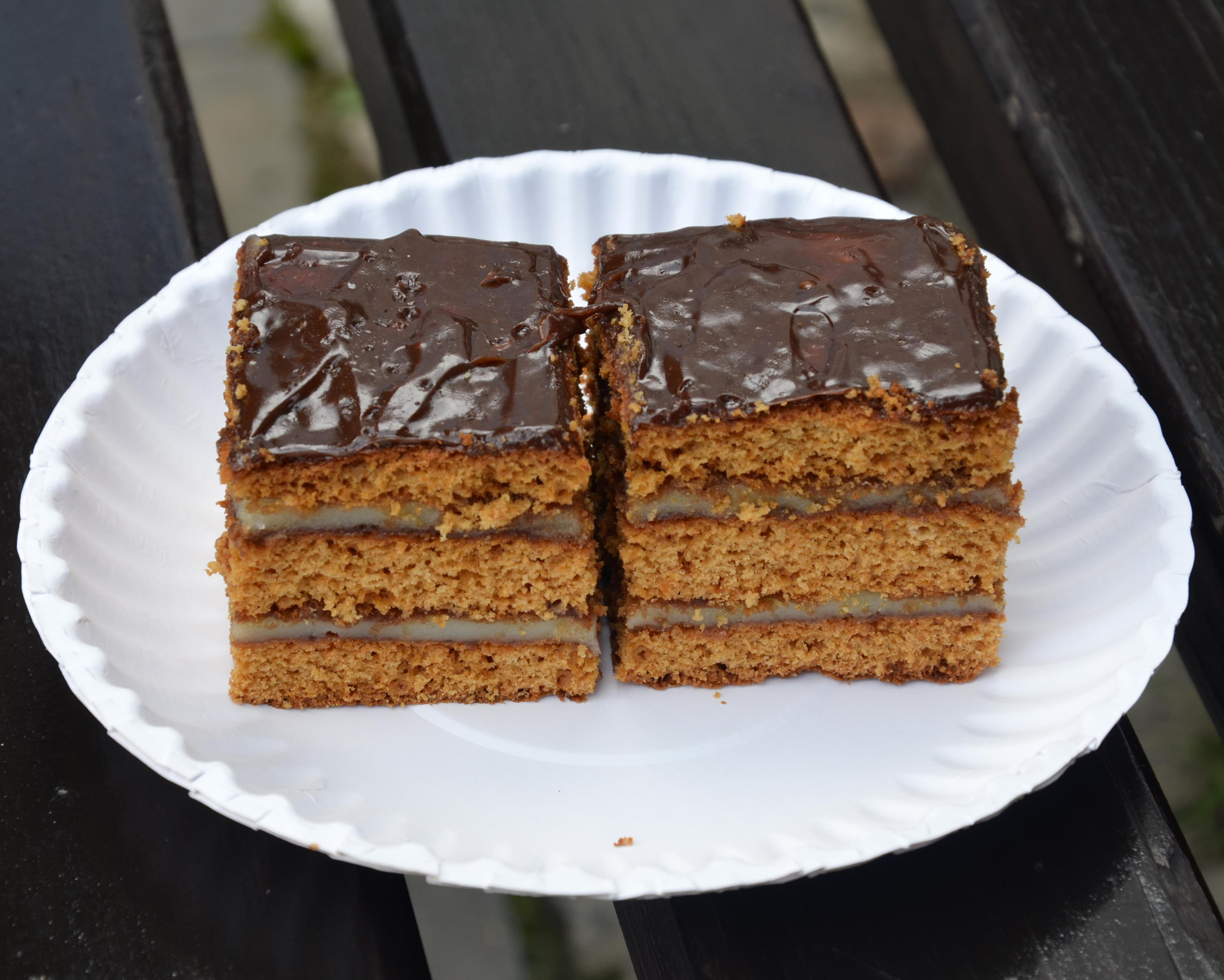 Beskidische Honigkuchen